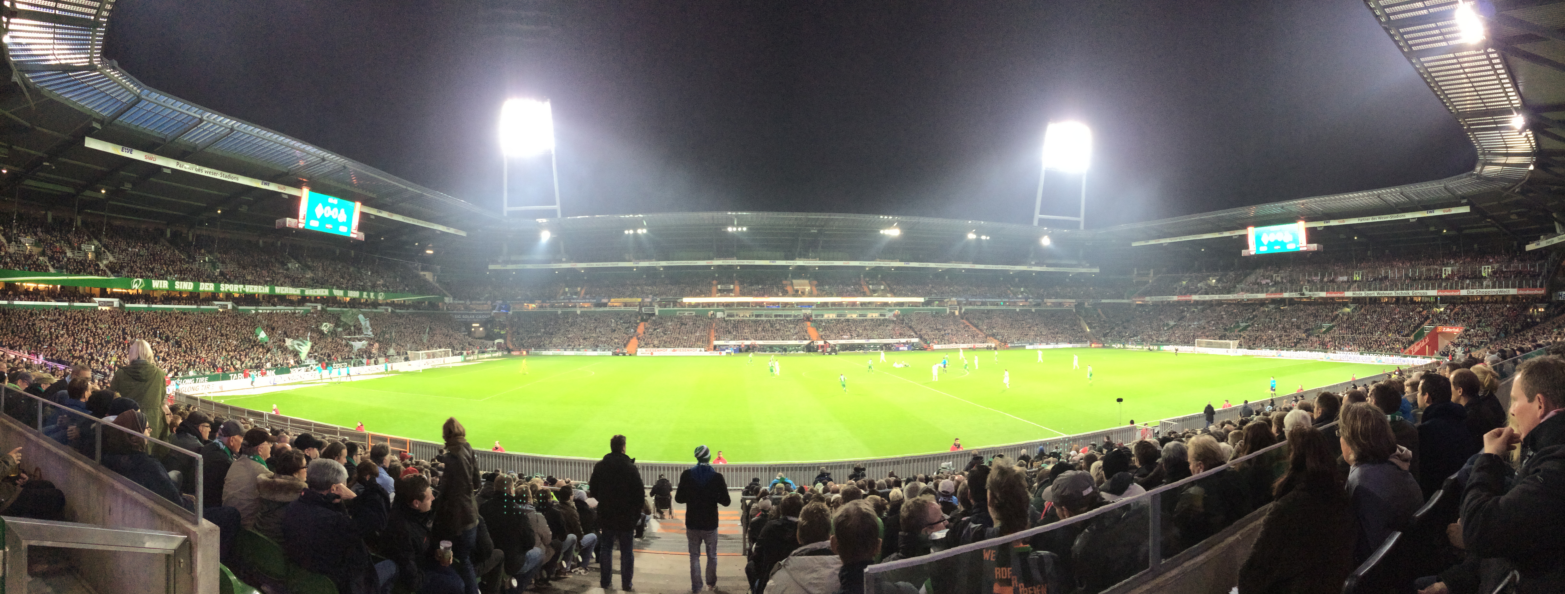 Weserstadion